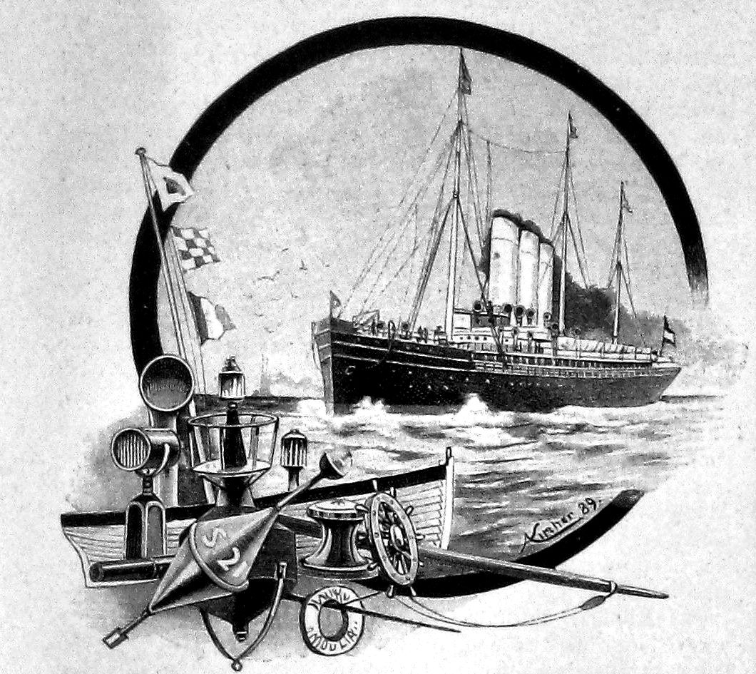 Schnelldampfer "Columbia"